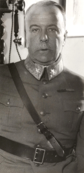 portrett, mann, generalmajor, halvfigur, uniform.